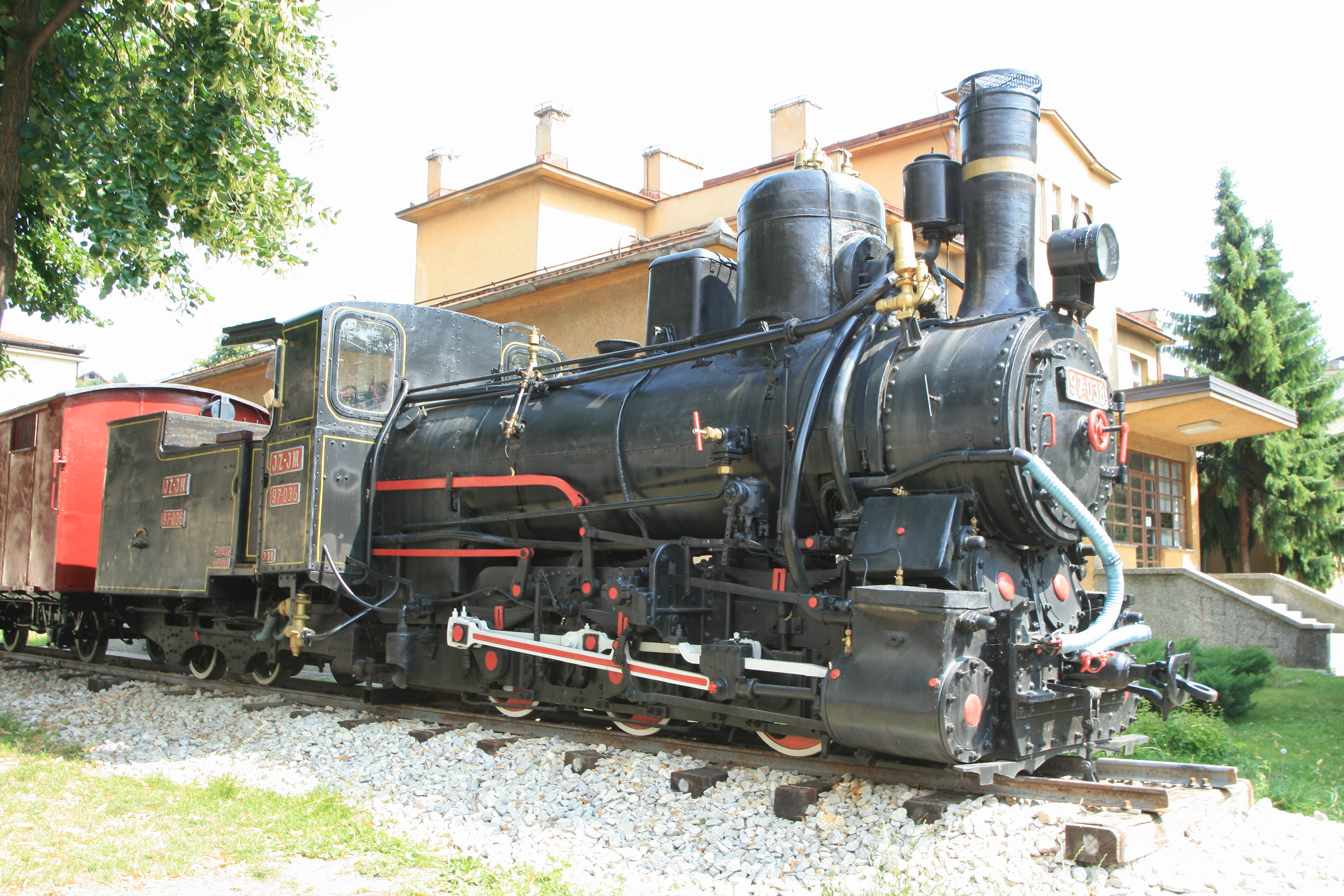 Travnik, Bosnia and Herzegovina